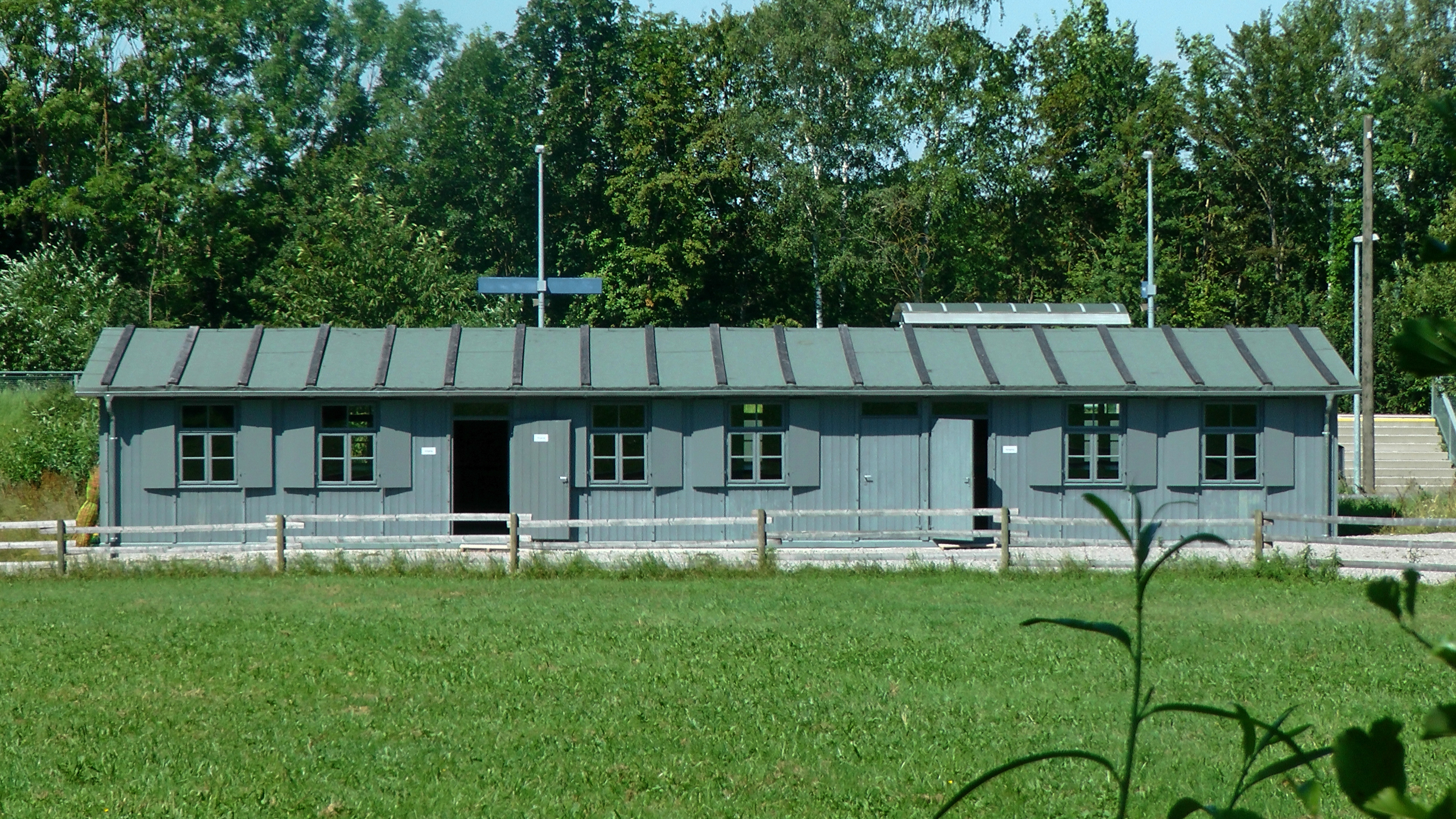 RAD-Baracke ehemals genutzt als Zwangsarbeiterbaracke im Freilandmuseum Wackershofen